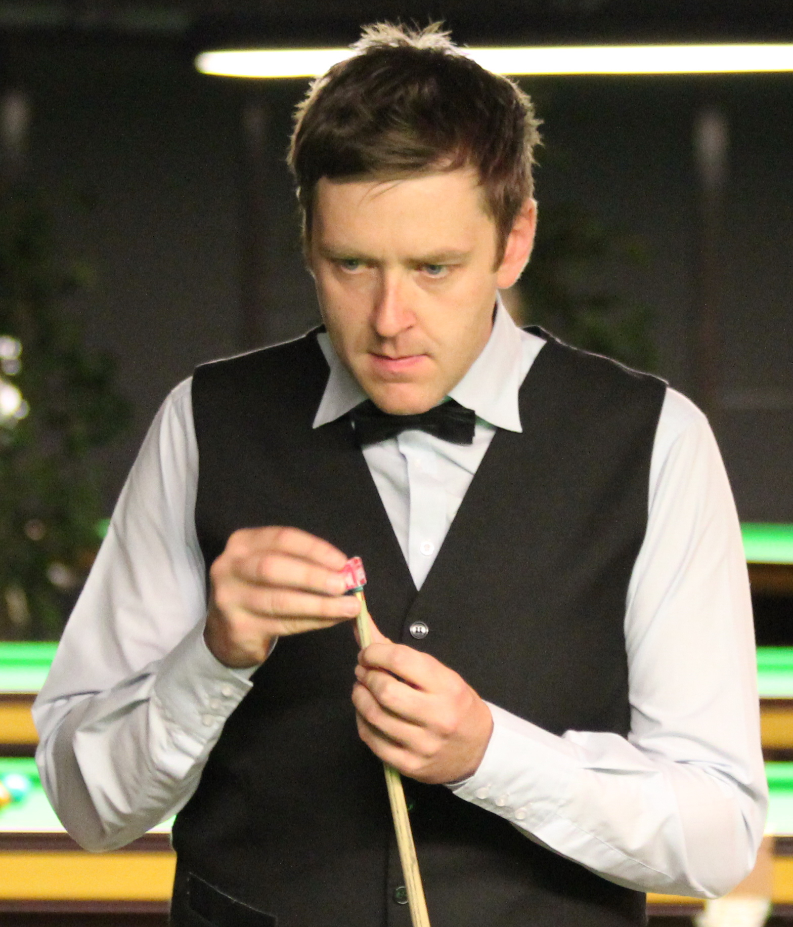 Ricky Walden beim Paul Hunter Classic 2012